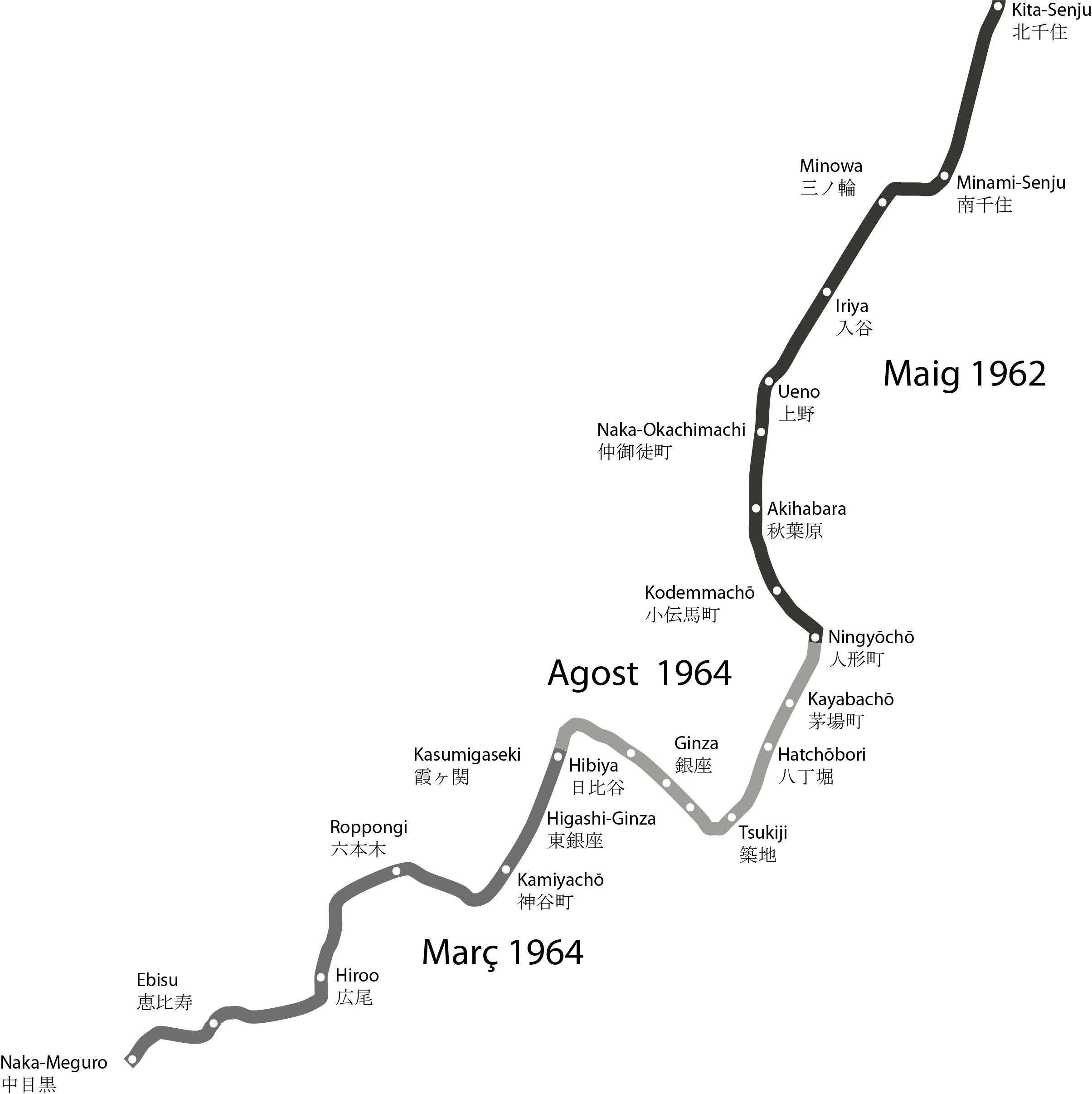 Seccions de la Hibiya Line i anys.